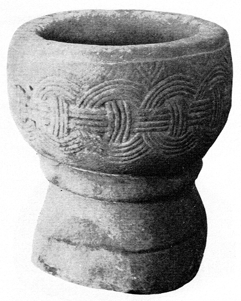 Kalvs kyrka. Dopfunt